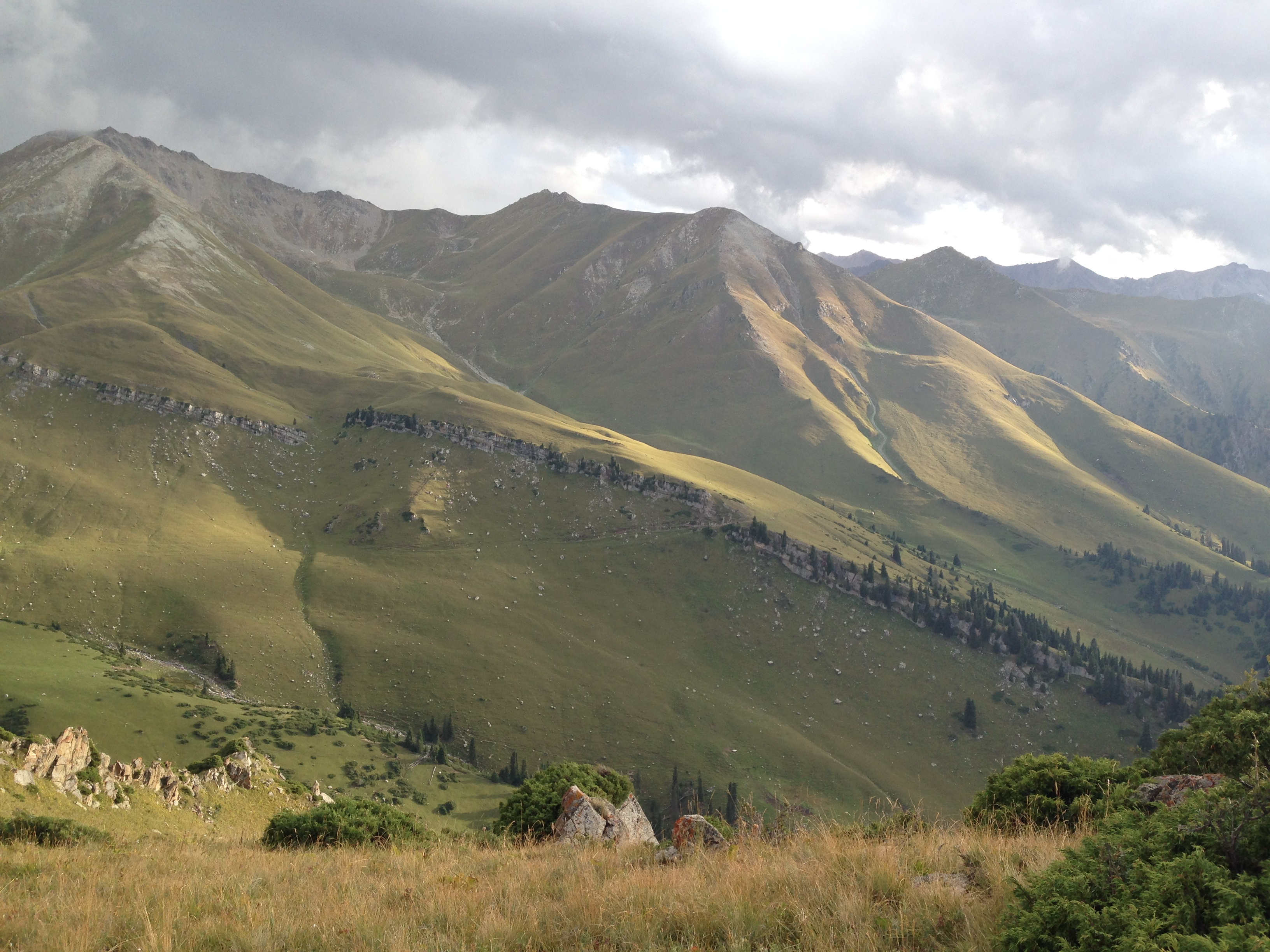 Вид на горы по пути на джайлоо, горы у подножья которых расположено село Ичке - Джергез